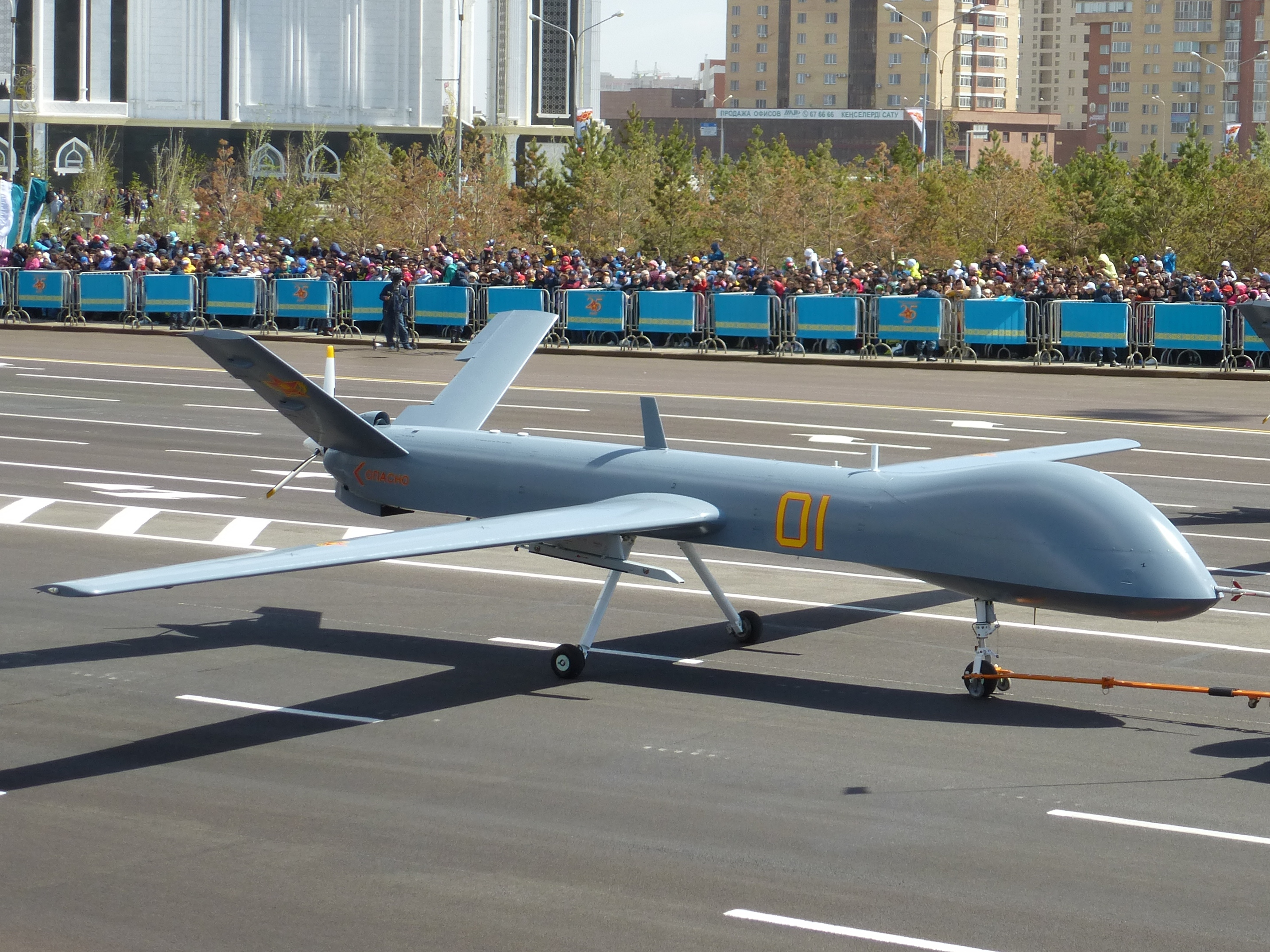 БПЛА Wing Loong на военном параде в Астане. 7.05.2017